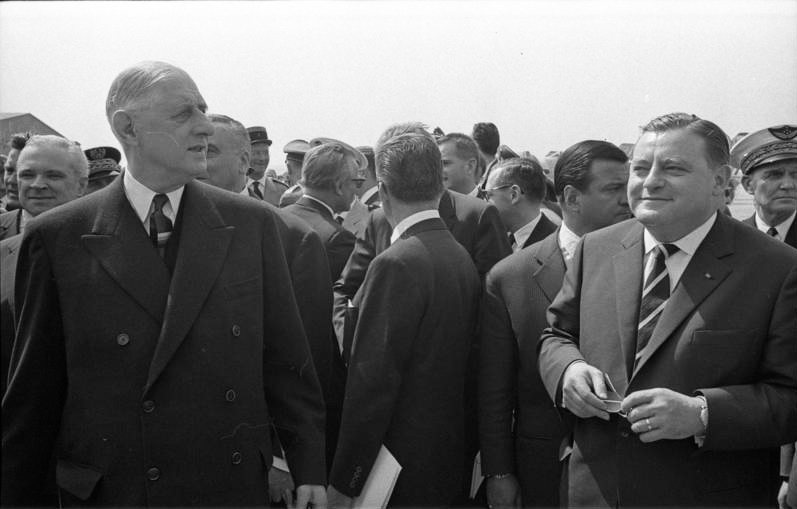 Reims / Frankreich Reise vom Bundeskanzler Konrad Adenauer nach Frankreich Präsident De Gaulle mit Bundesminister (Verteidigung) Franz Josef Strauß